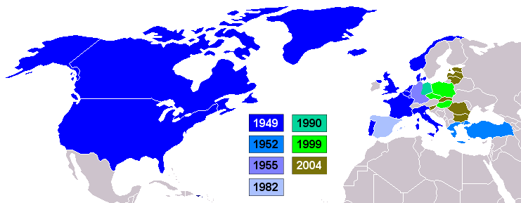 Nato Staaten und Aufnahmejahr